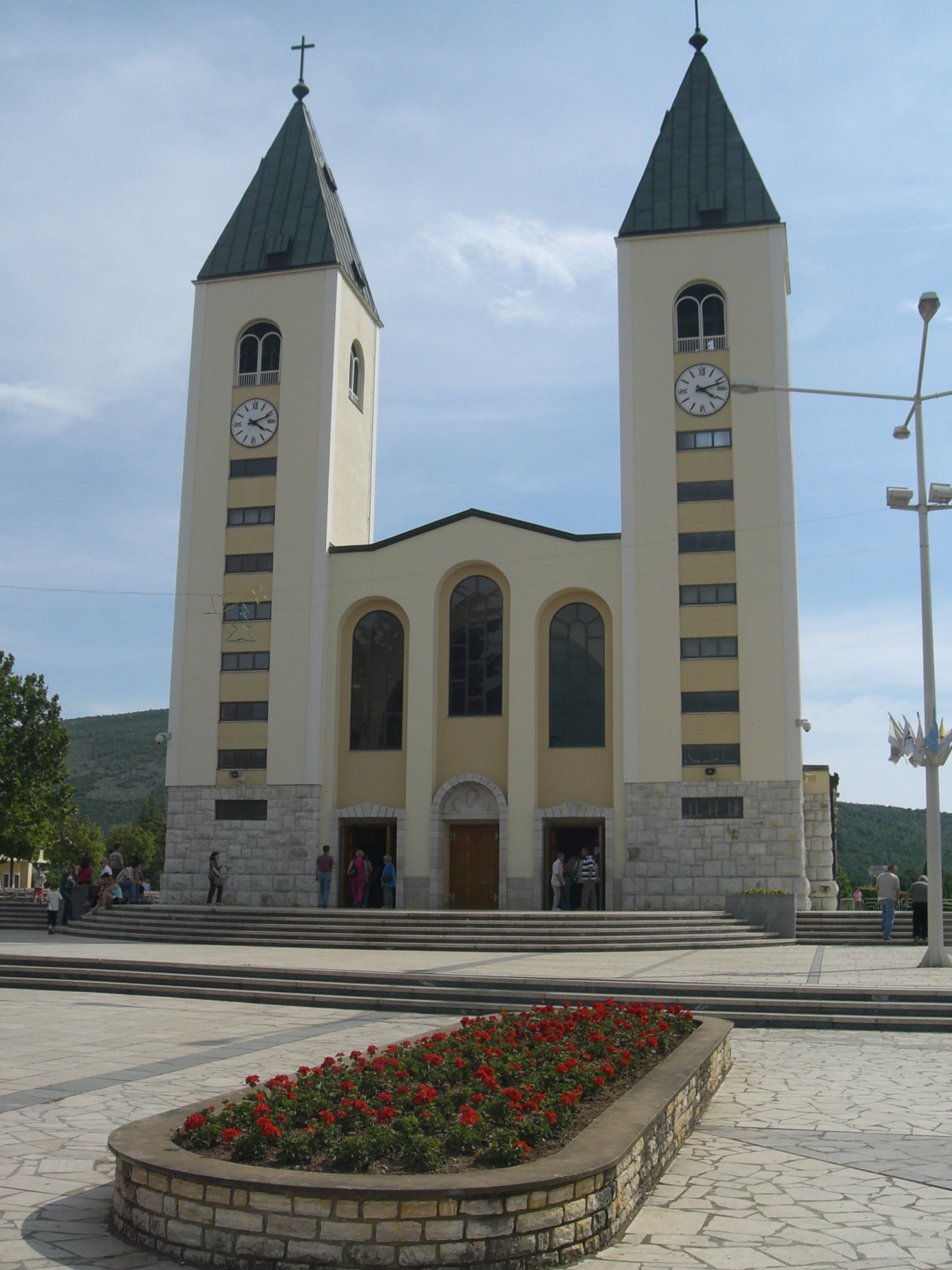 Church in Međugorje, Bosnia and Herzegovina